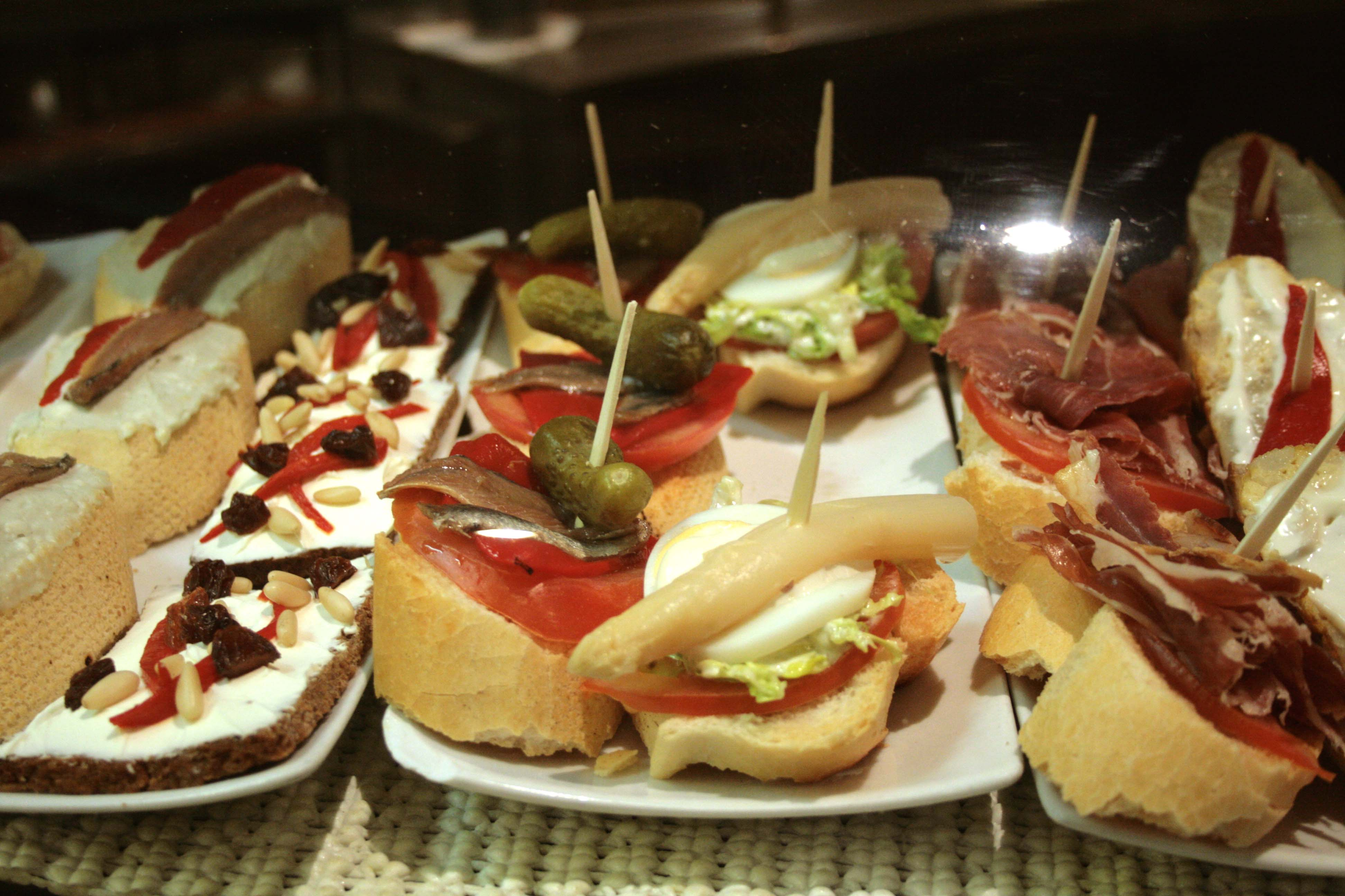 Tapas diversas (Bar de Zaragoza)